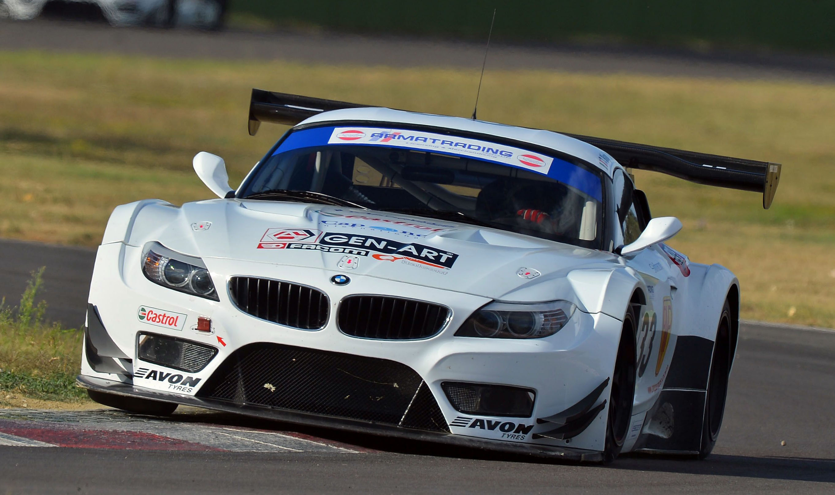 Stefano Colombo in azione